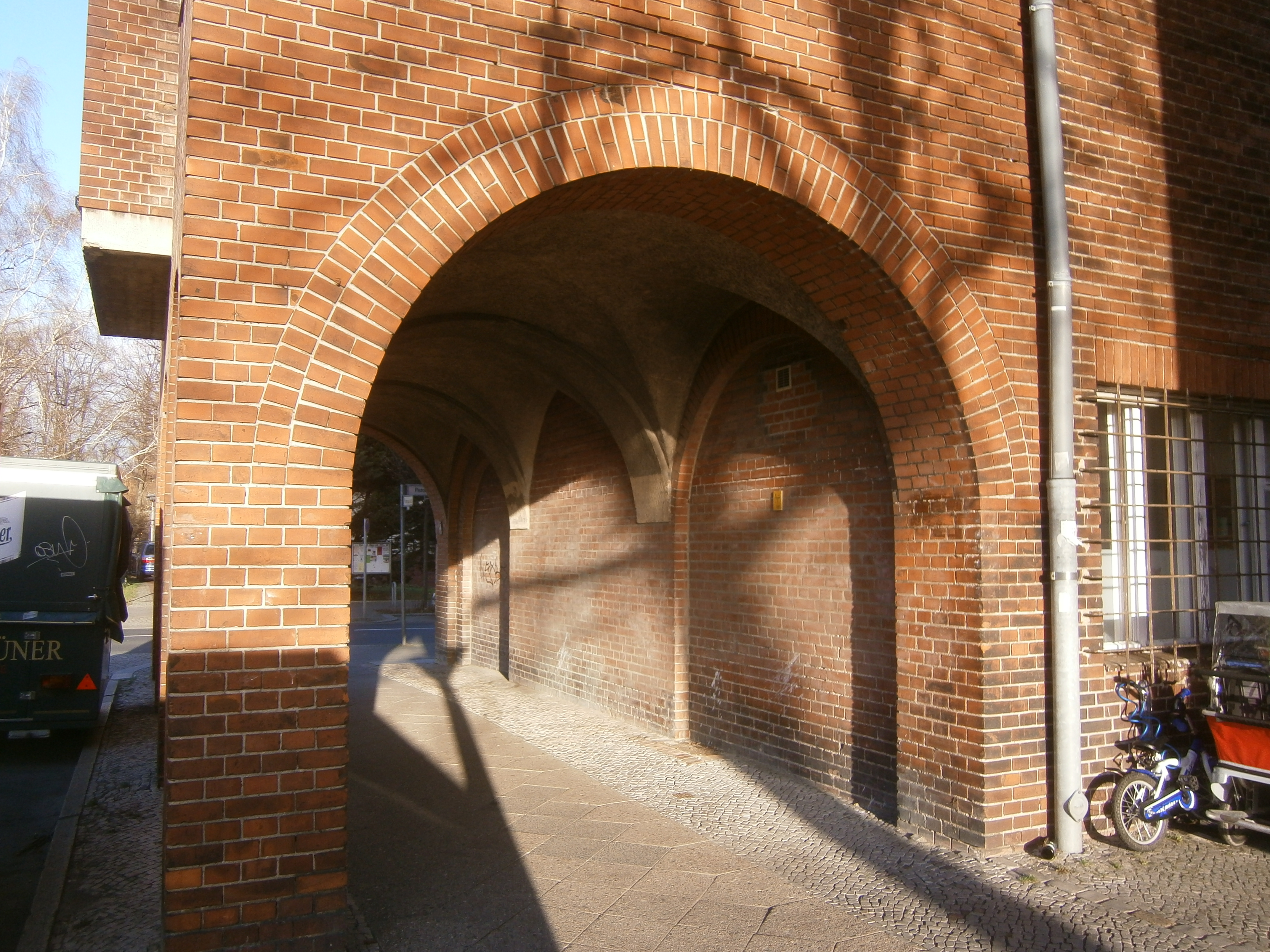 Der Pistoriusplatz ist ein Platz im Berliner Ortsteil Weißensee. Im Bild der Torbogenbau an der Pistorisstraße als Abschluss des Wohnblocks an der Nordostecke.